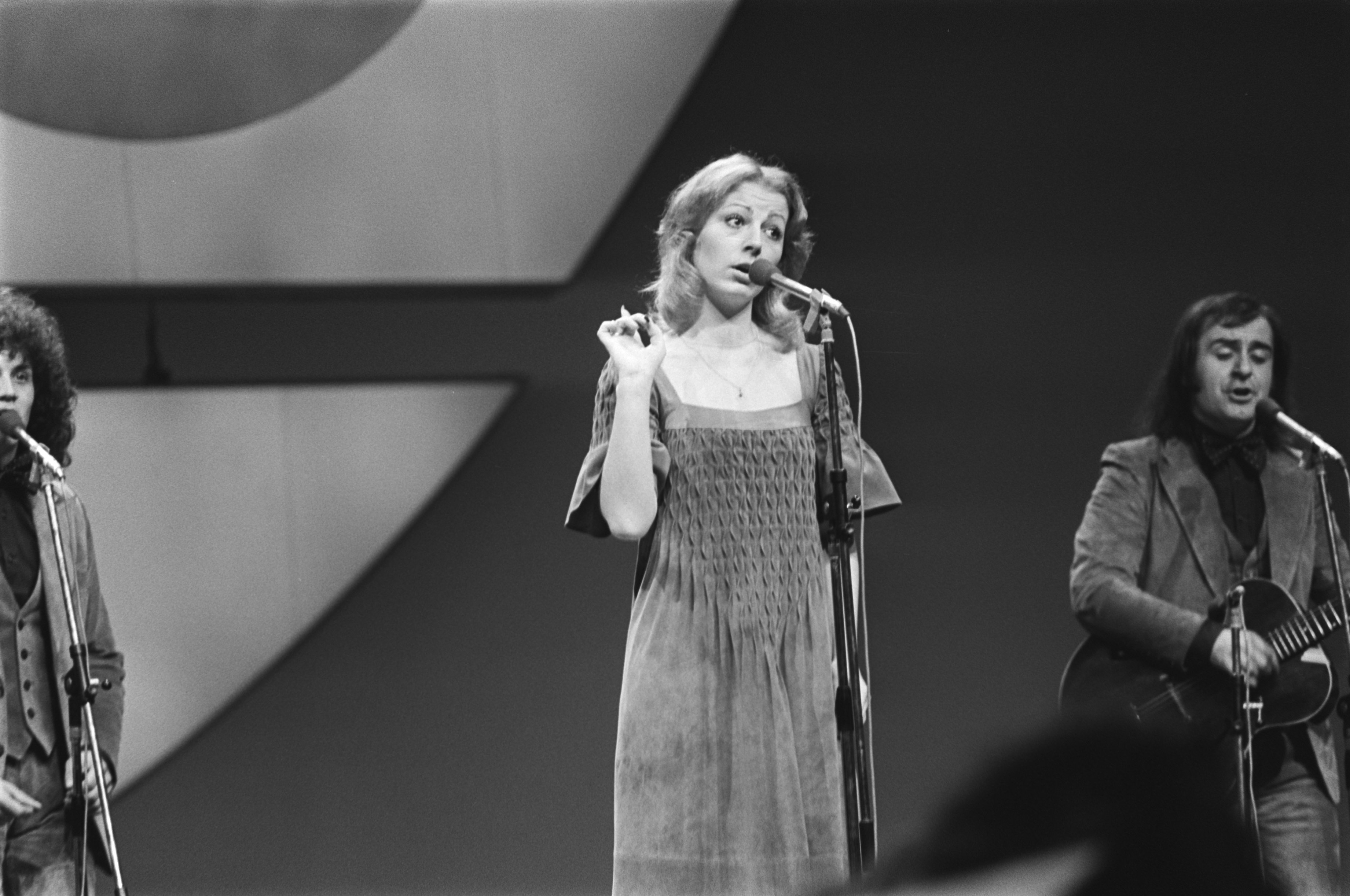 Collectie / Archief : Fotocollectie Anefo Reportage / Serie : [ onbekend ] Beschrijving : Eurovisie Songfestival 76 Den Haag ; Ambasadori (Joegoslavie) Datum : 3 april 1976 Locatie : Den Haag, Joegoslavië Trefwoorden : songfestivals Persoonsnaam : Eurovisie Songfestival Fotograaf : Mieremet, Rob / Anefo Auteursrechthebbende : Nationaal Archief Materiaalsoort : Negatief (zwart/wit) Nummer archiefinventaris : bekijk toegang 2.24.01.05 Bestanddeelnummer : 928-5016